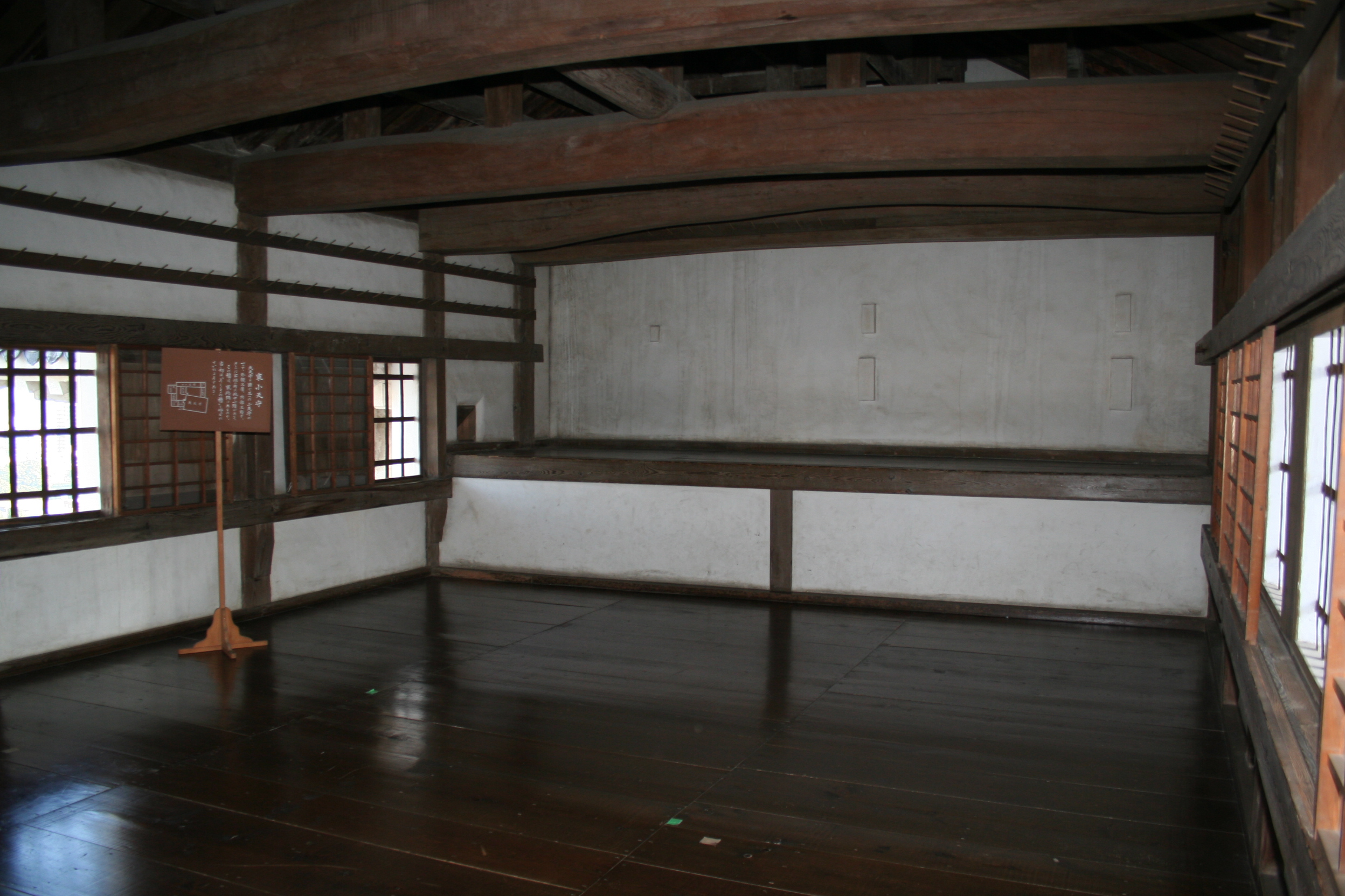 2009年秋の姫路城。 東小天守1階部分。